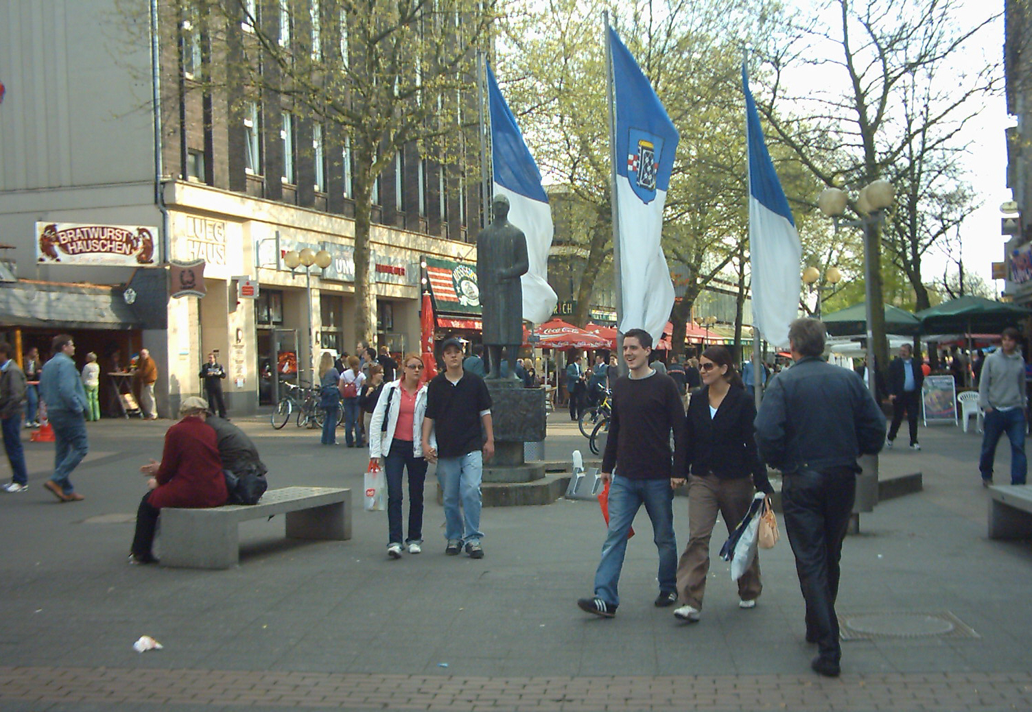 Engelbertbrunnen und Unionkino im Herzen des Bermudadreiecks (Bochum / Kortumstrasse)